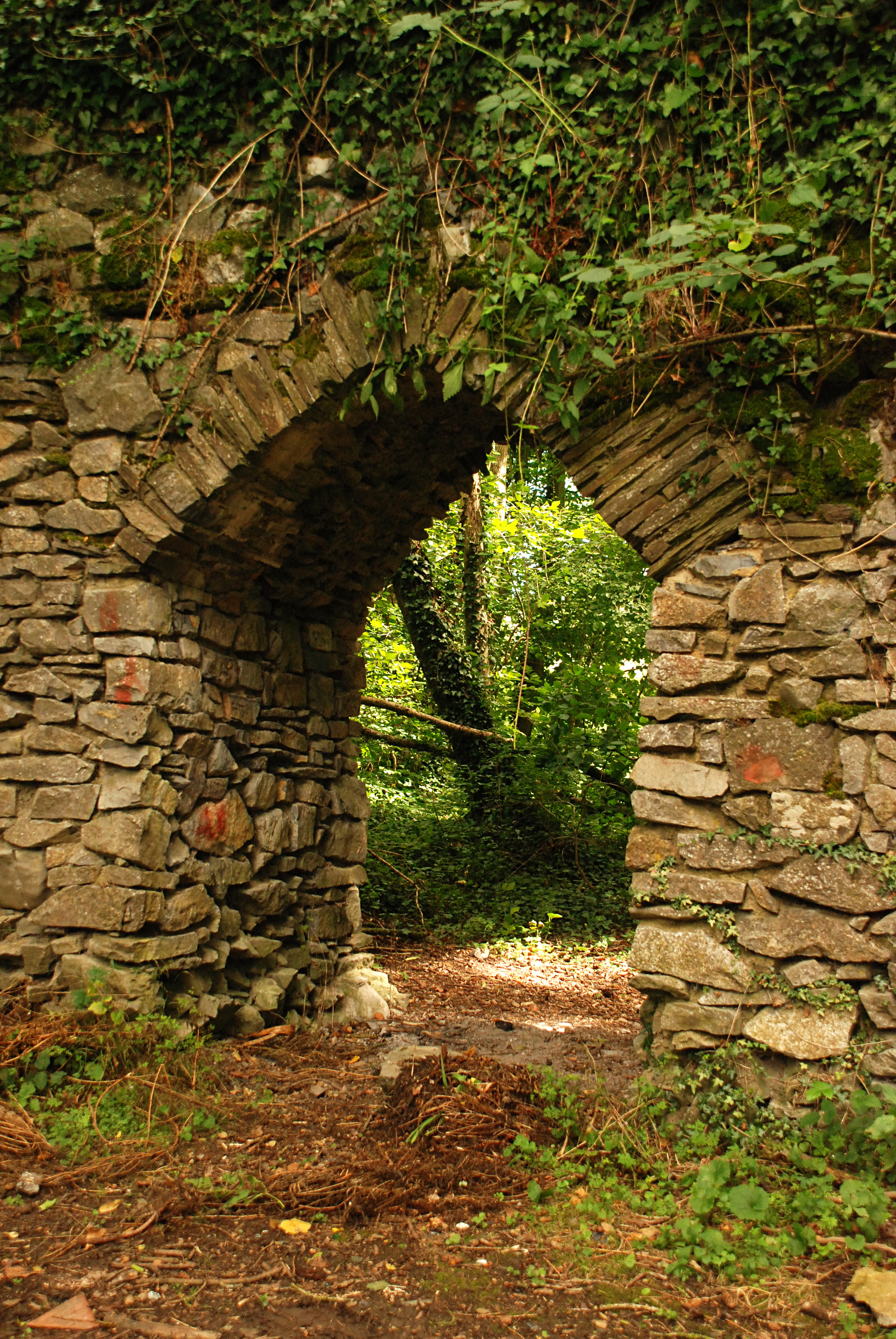 Aqueduc romain de Mettet